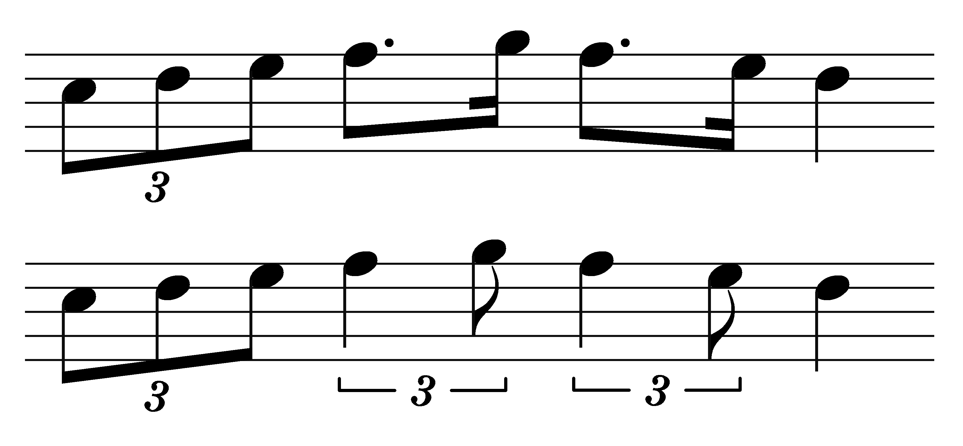 Punktierte Achtelkette als Triole